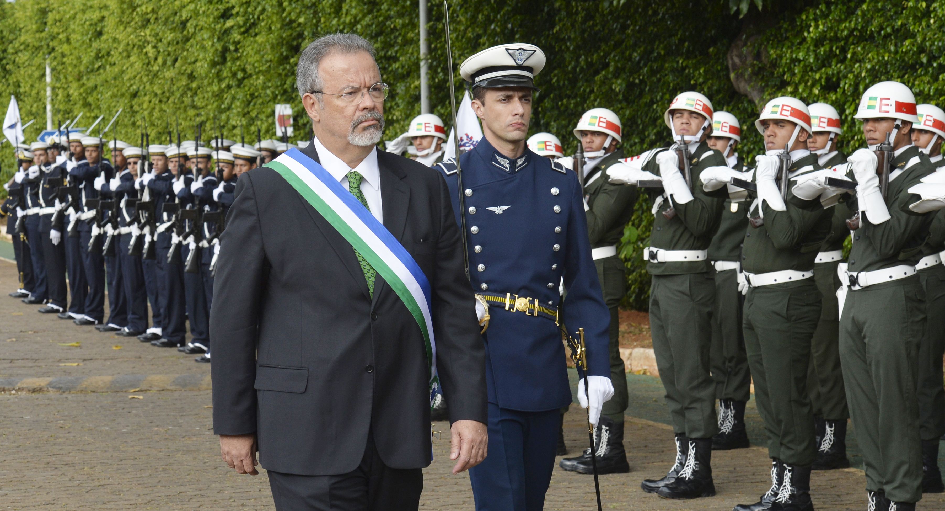 16/05/2016, Brasília - DF Fotos: Gilberto Alves